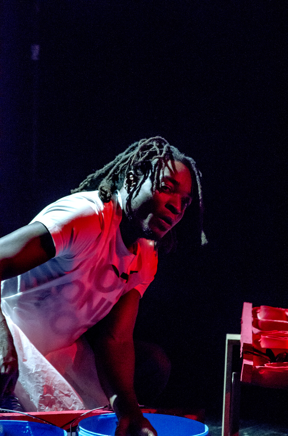 Wantina jouant dans la pièce d'Eric androa 2015